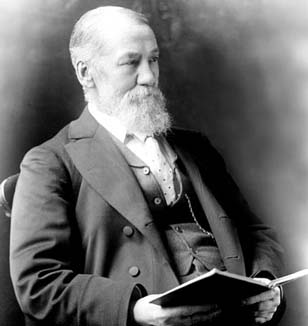 Retrat de Robert Tucker (1832-1905), matemàtic britànic